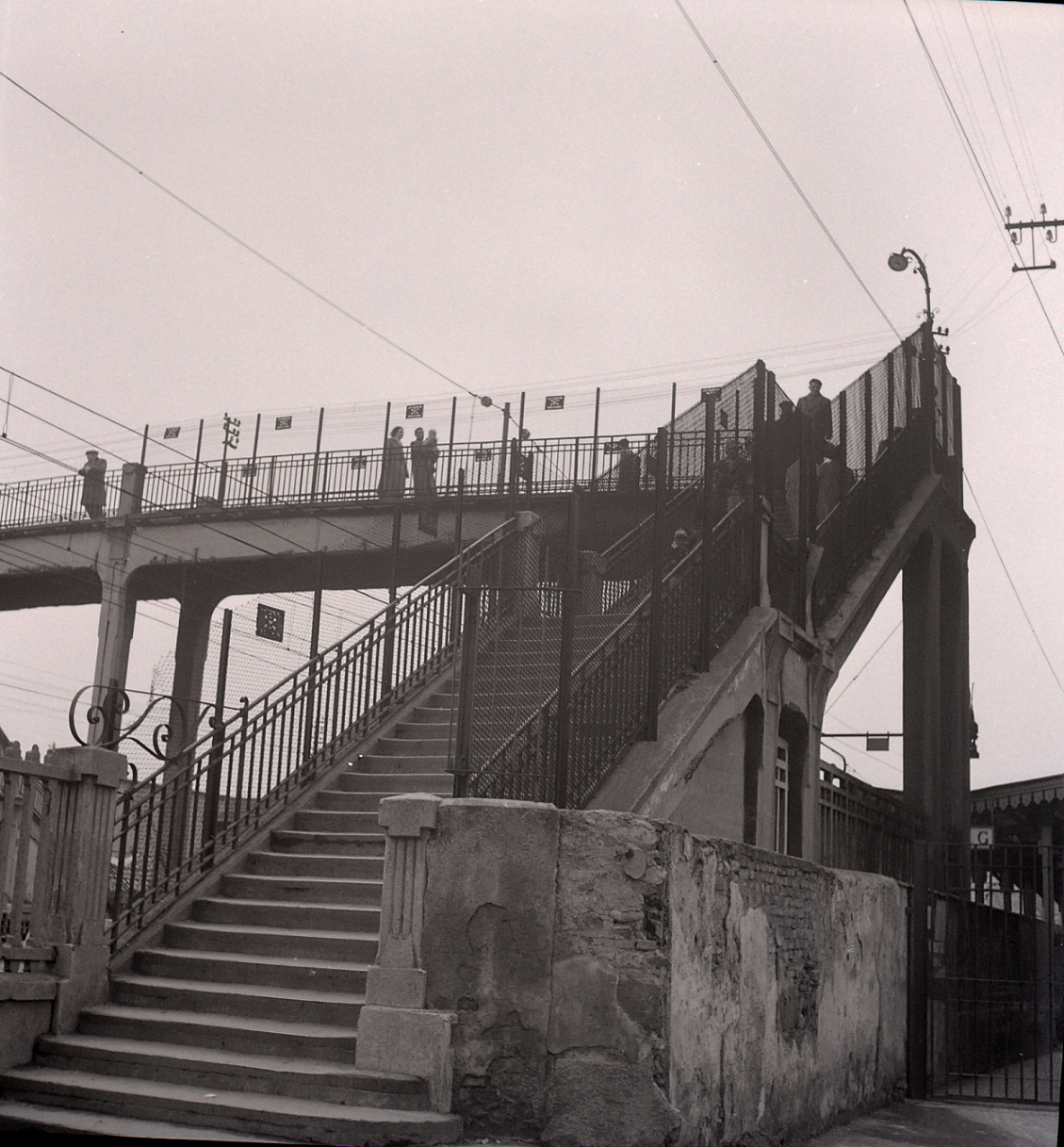 Serie fotografica : Sesto San Giovanni, 1970 / Paolo Monti. - Buste: 6, Fototipi: 6 : Negativo b/n, gelatina bromuro d'argento/ pellicola ; 6x6. - ((Serie costituita da 6 negativi identificati con i nn.: 8556-8561. La suddetta serie è contenuta nella scatola identificata con la numerazione R8371-8564. Sul coperchio della scatola manoscritto: "Milano Periferia". Sulla busta 8556 manoscritto: "Sesto S.G.". - Sesto Rondò